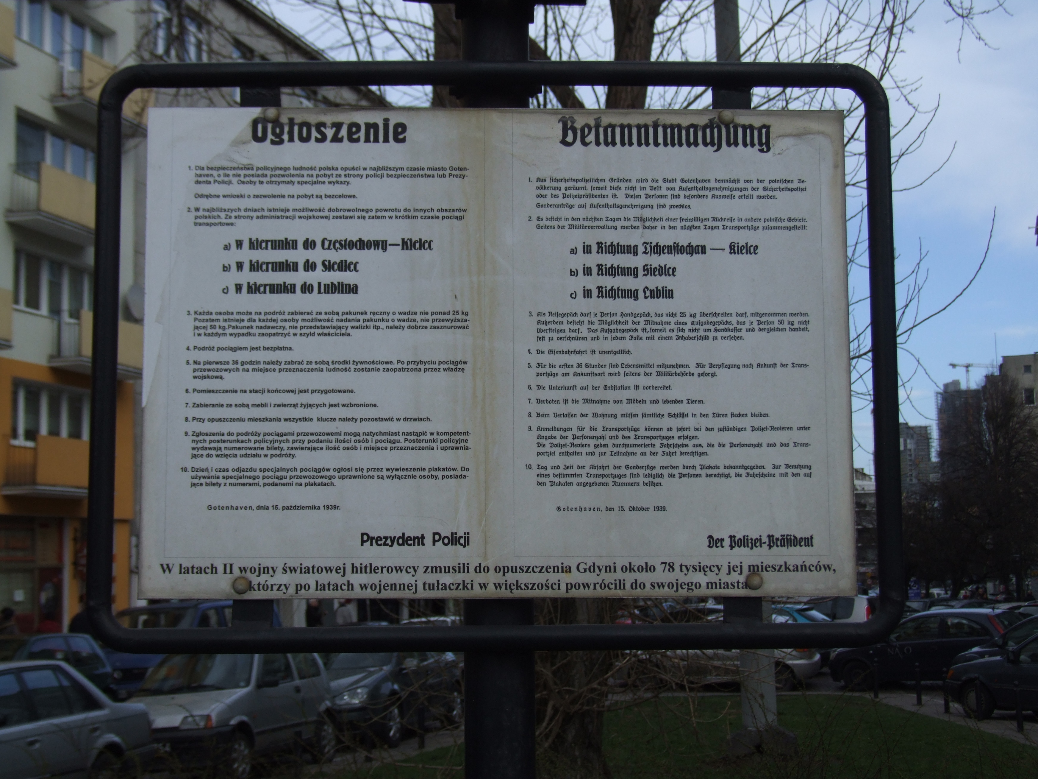 plac Gdynian Wysiedlonych, Gdynia